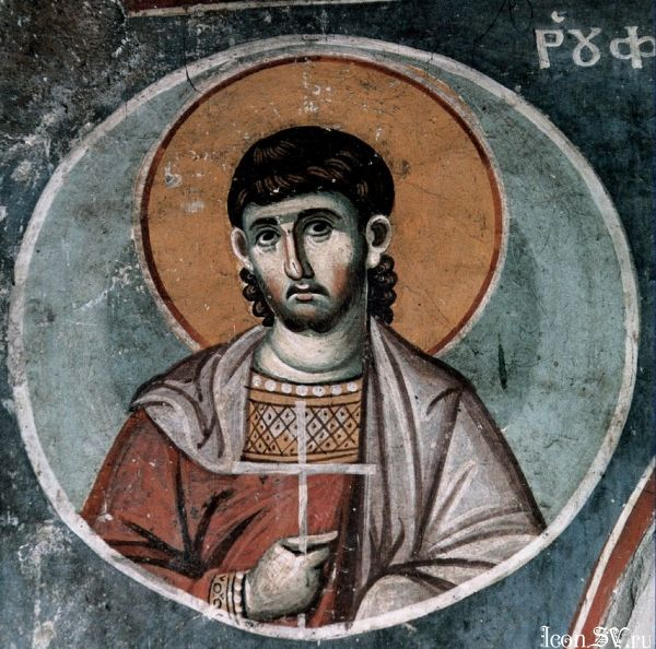 Святитель Руф , епископ Фивский, апостол от 70-ти